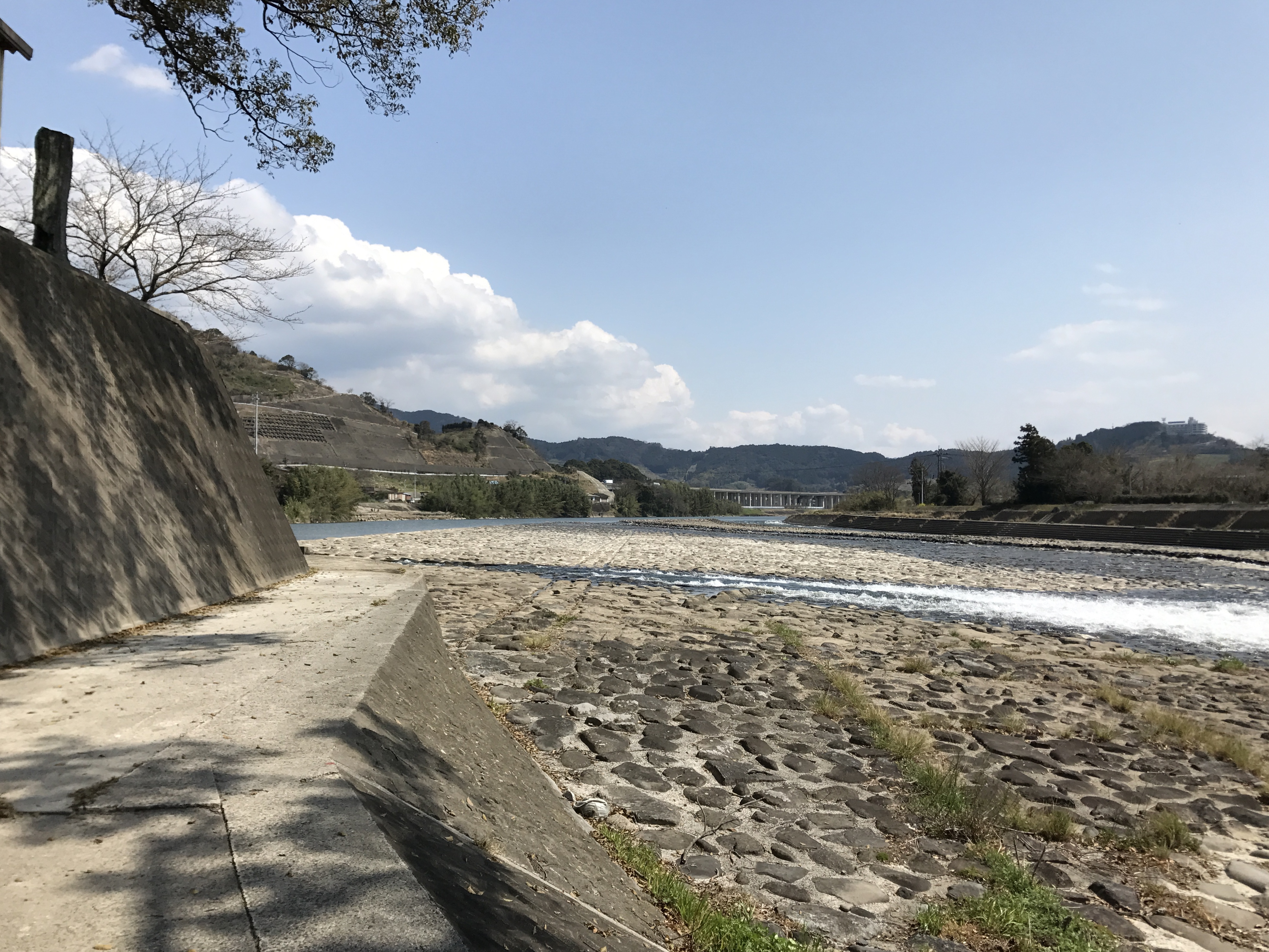 筑後川・山田堰の全景